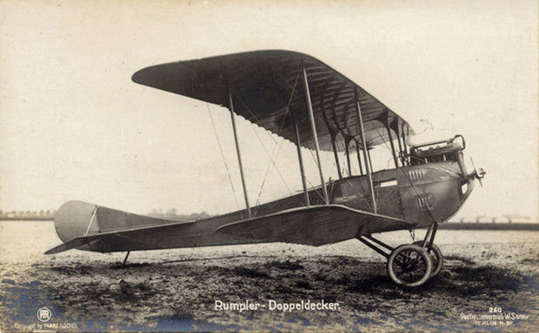 Rumpler C.I auf der Sanke Postkarte 260